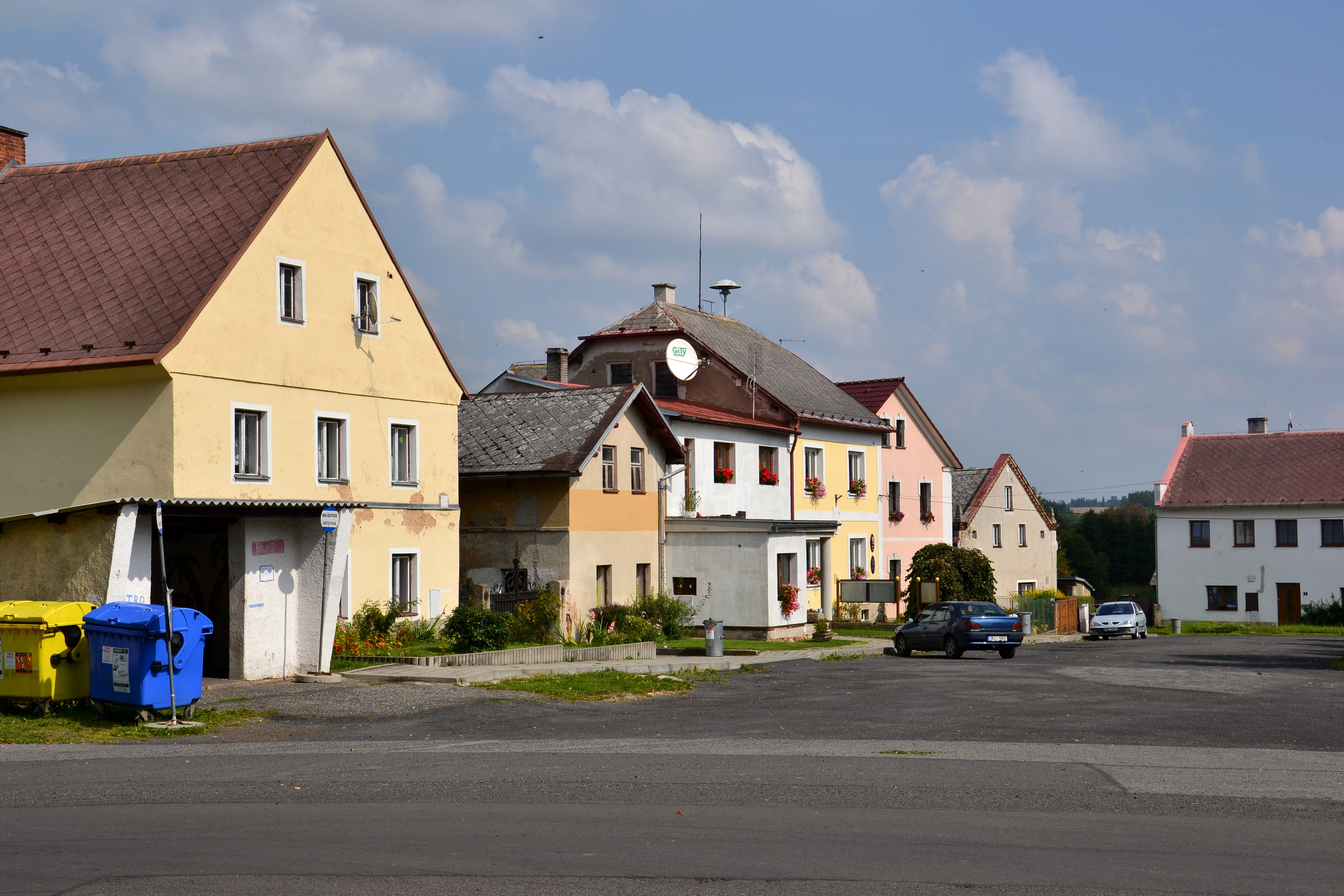 Severní strana návsi